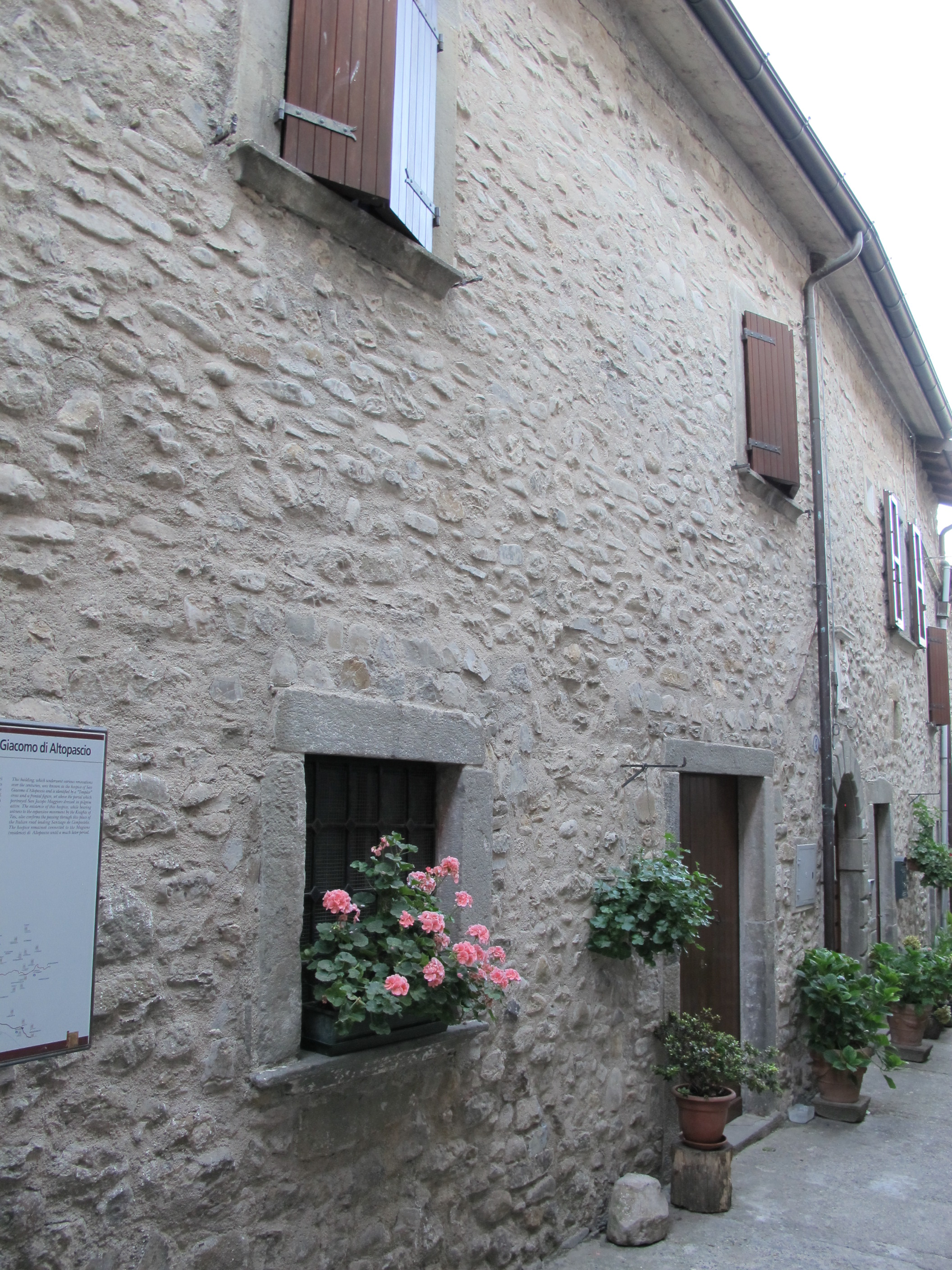 Filattiera, ospedale di san jacopo d'altopascio